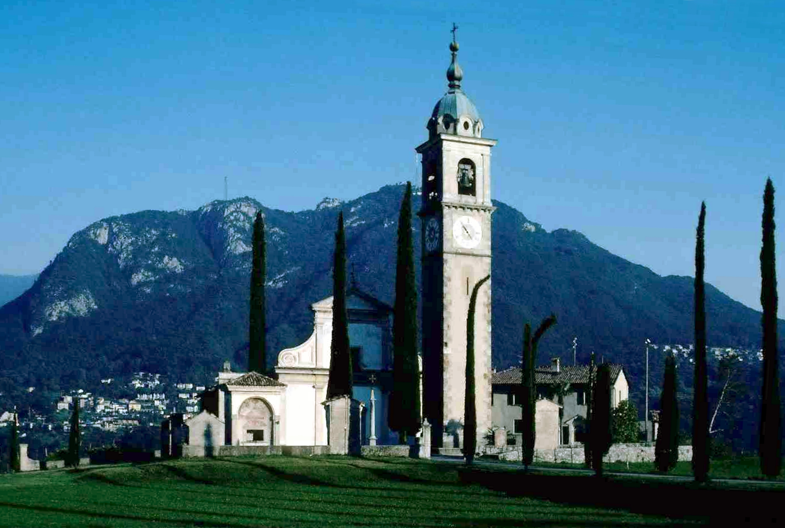 San Abbodio, Gentilino (Collina d'Oro, Bezirk Lugano, Kanton Tessin, Schweiz)